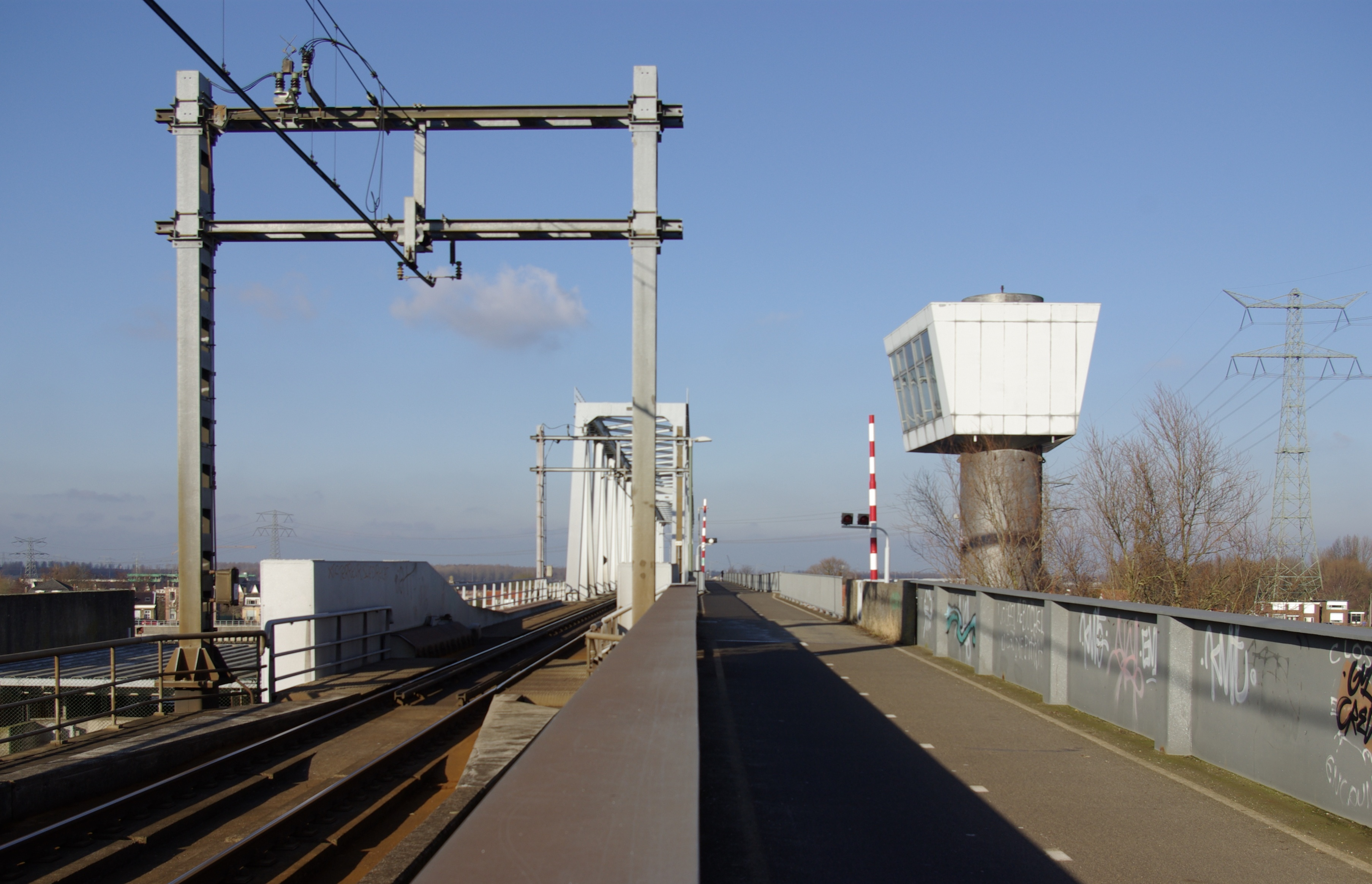 Baanhoekbrug